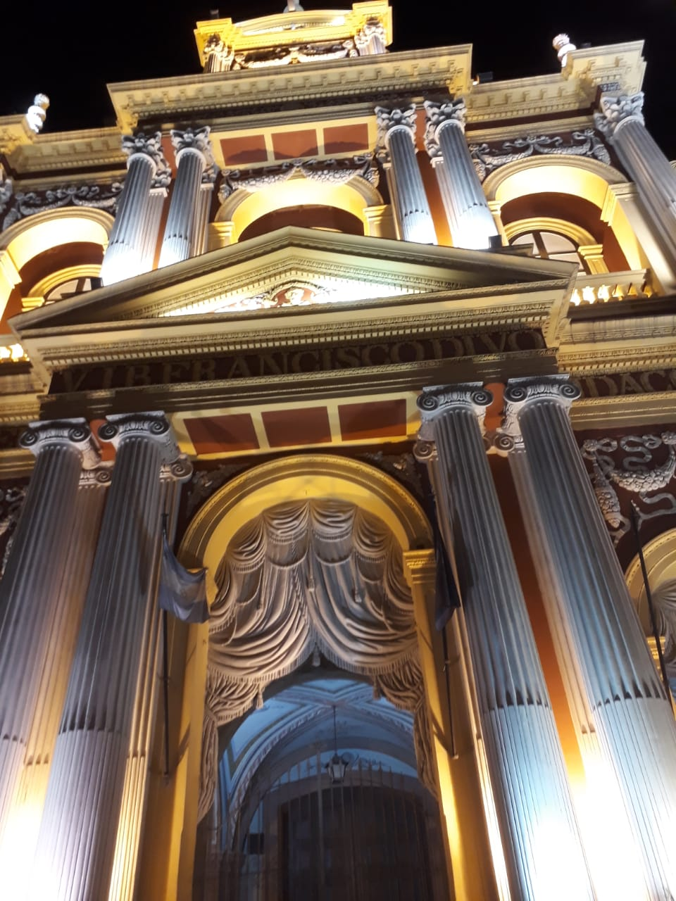 Es un templo católico de orden franciscana. Estilo barroco italianizante. Posee la torre más alta de sud América. Fué declarada monumento histórico nacional 1941basílica San Francisco